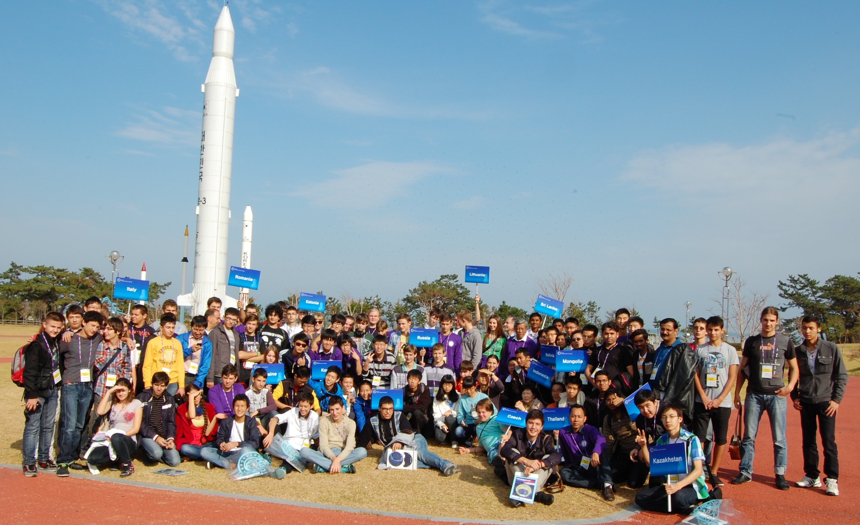 2012. a 17. Rahvusvahelise astronoomiaolümpiaadi osalejad Naro kosmosekeskuses Koreas.